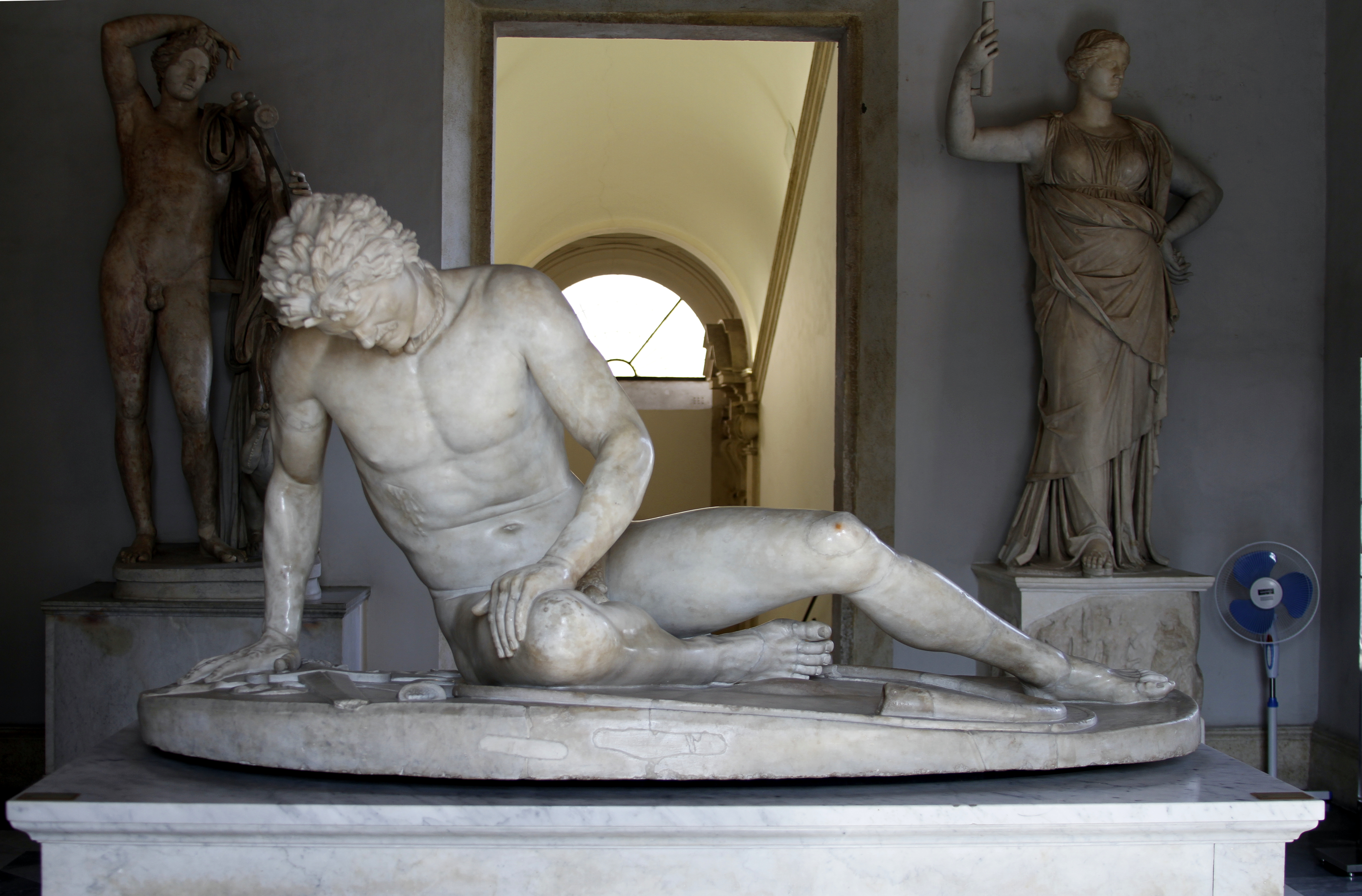 Palazzo Nuovo - Musei Capitolini - Rome